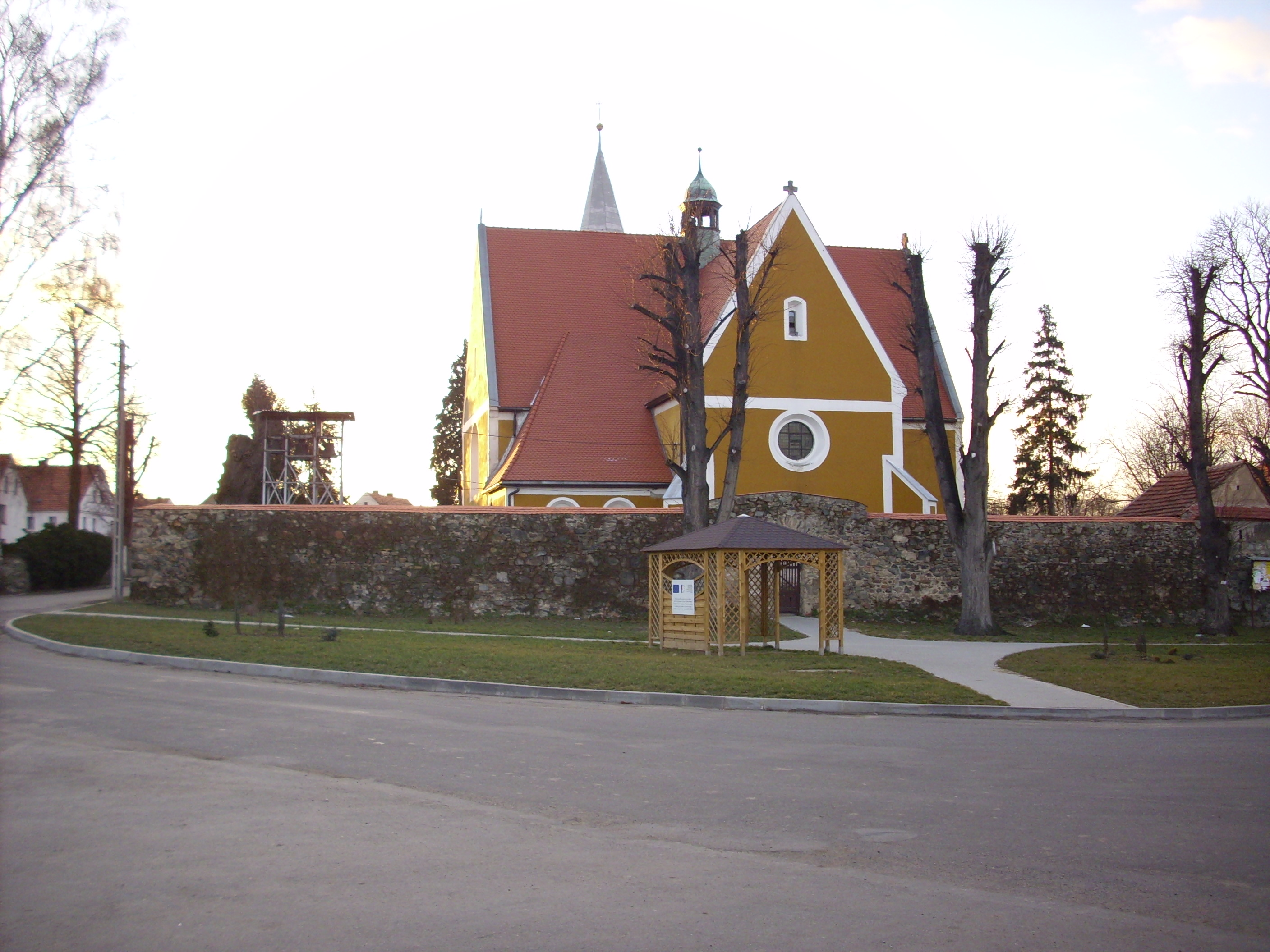 Wiry, województwo dolnośląskie. Kościół pw. św. Michała Archanioła z XV w., przebudowany w wieku XVII. 22.05.1966.